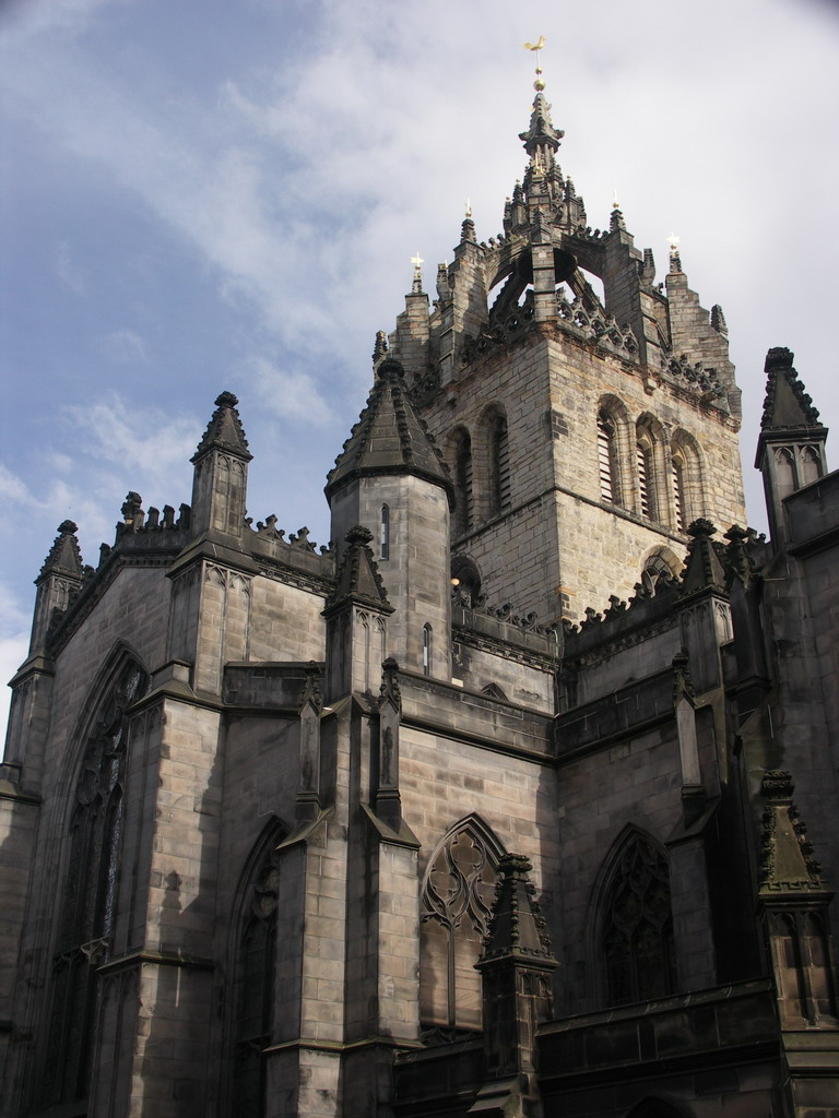 Turm und Querschiff der St. Giles-Cathedral, Edinburgh Sonstiges